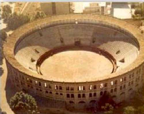 Plaza de toros, Requena. La Plaza de Toros de Requena es propiedad de la Administración y cedida al M.I. Ayuntamiento por 100 años. Se comenzó su construcción en 1877, pero esta tuvo que ser paralizada dos veces por motivos de la guerra carlista y una epidemia de cólera. La junta de accionistas que se hizo cargo de la construcción del inmueble que tuvo que afrontar unos gastos totales de 43.267,53 pesetas. Tiene una preciosa fachada neomudejar y fue inaugurada el 17 de septiembre de 1901.